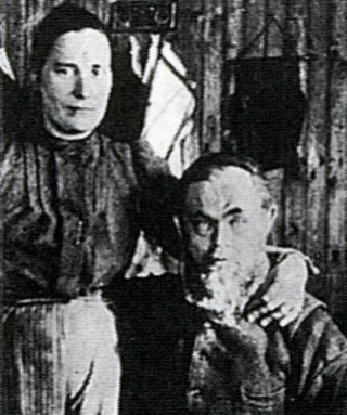 Undergöraren "Nybo-Kalle" (Karl Persson) och hustru Anna